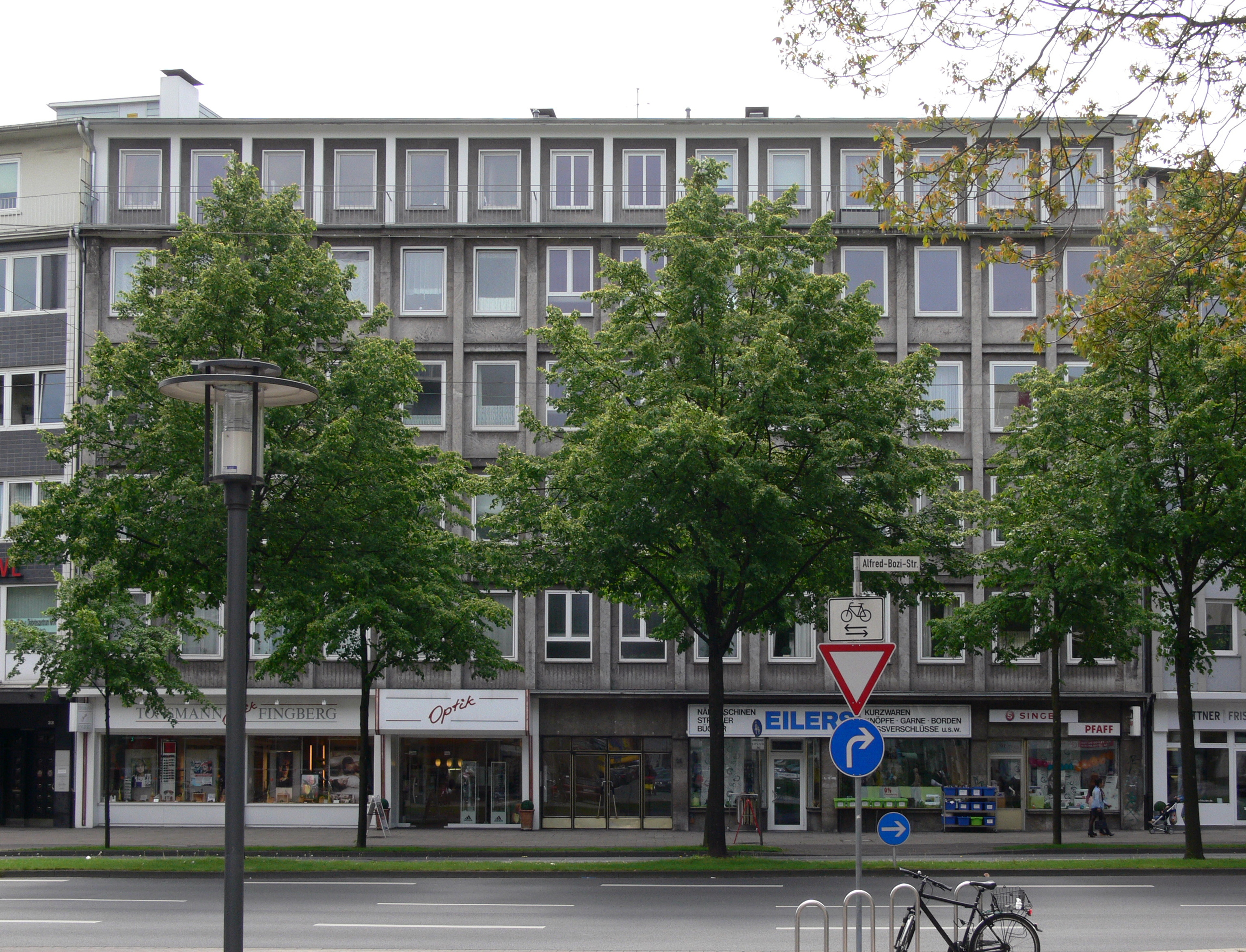 Bielefeld Oberntorwall 21; Sitz der Aisthesis Verlag GmbH & Co. KG